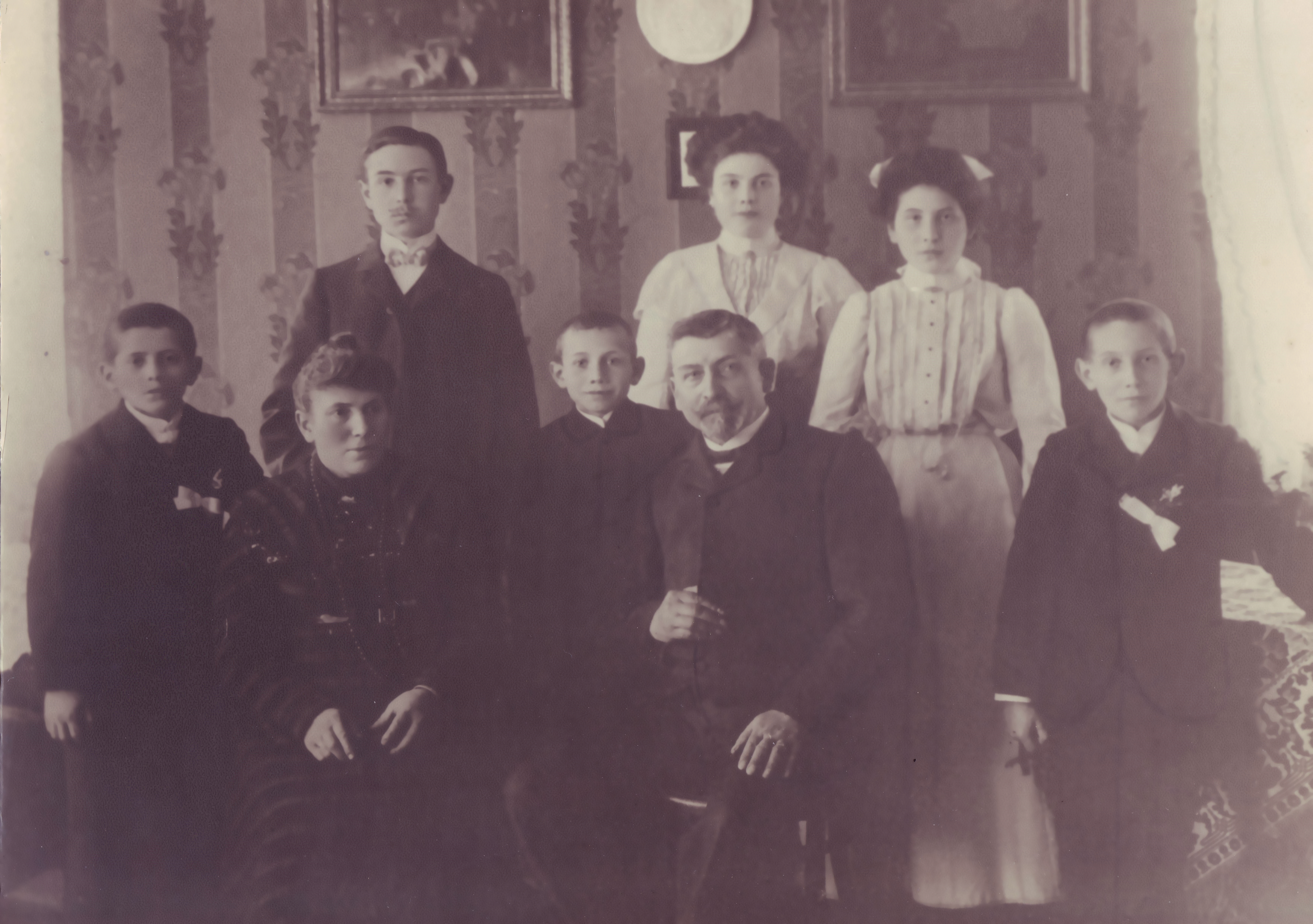 Familienproträt